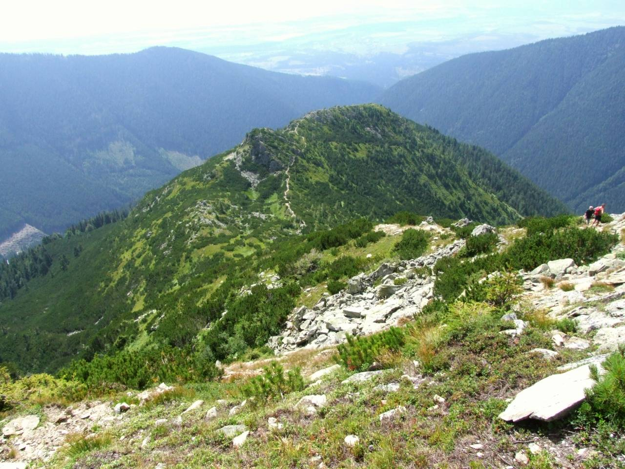 Ostredok (grań Otargańców w Tatrach Zachodnich)